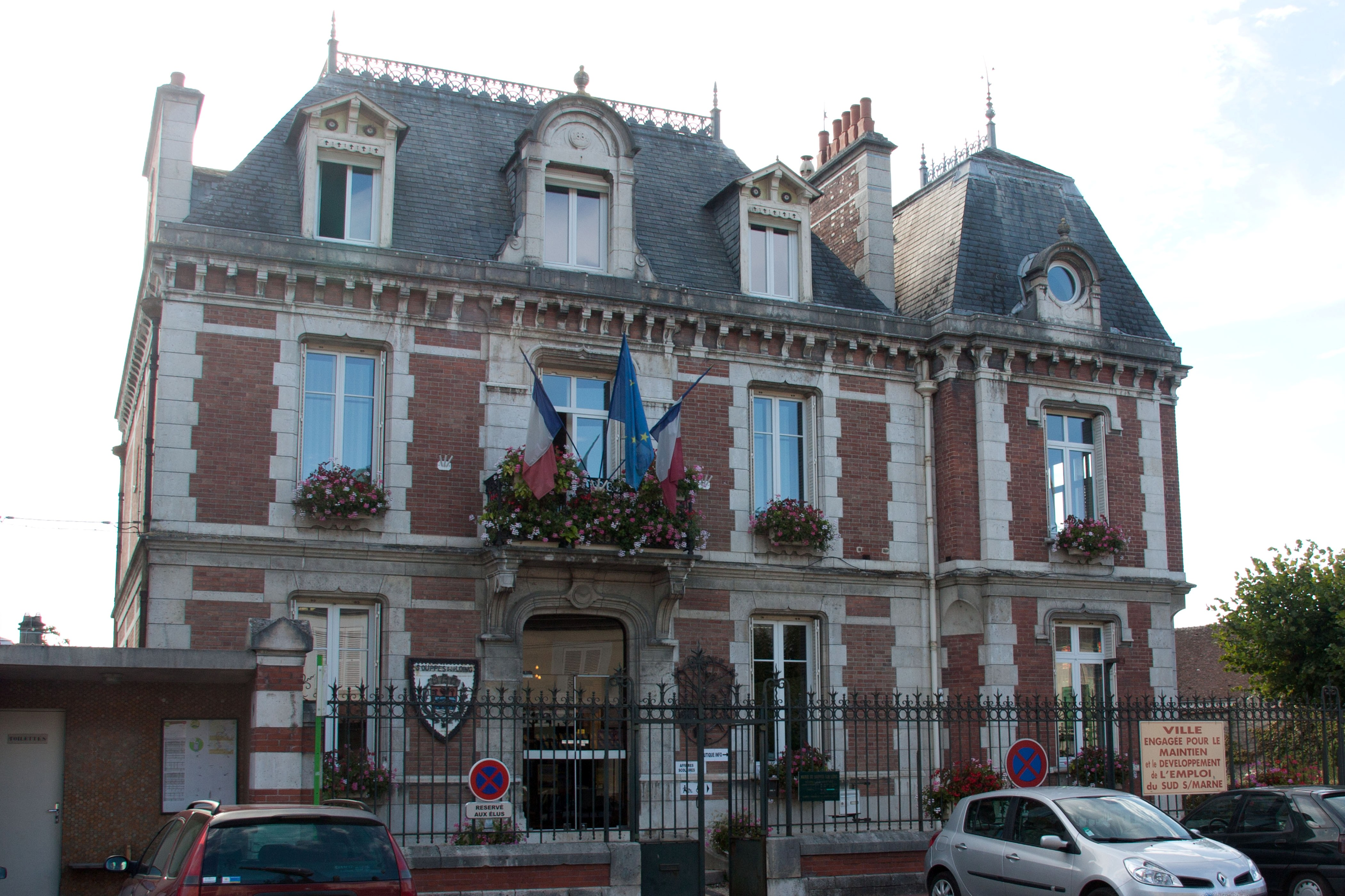 Mairie de Souppes-sur-Loing, Souppes-sur-Loing, Seine-et-Marne, France